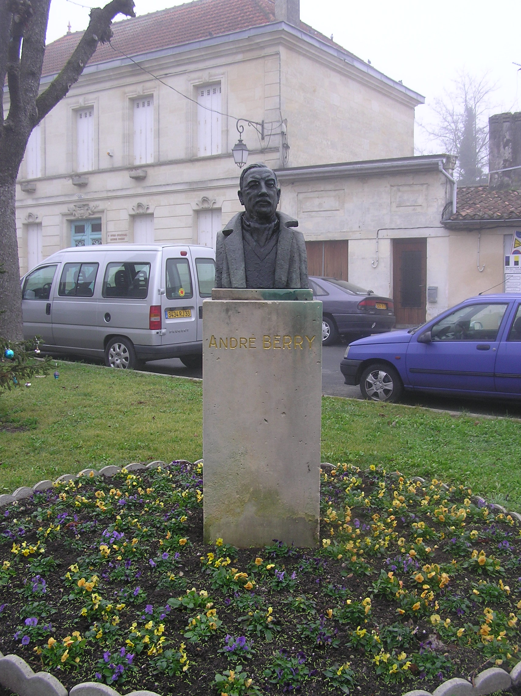 Photographie buste de André Berry